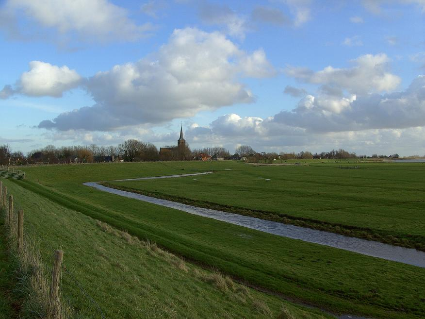 Schellinkhout gezien vanaf de Westfriese Omringdijk.